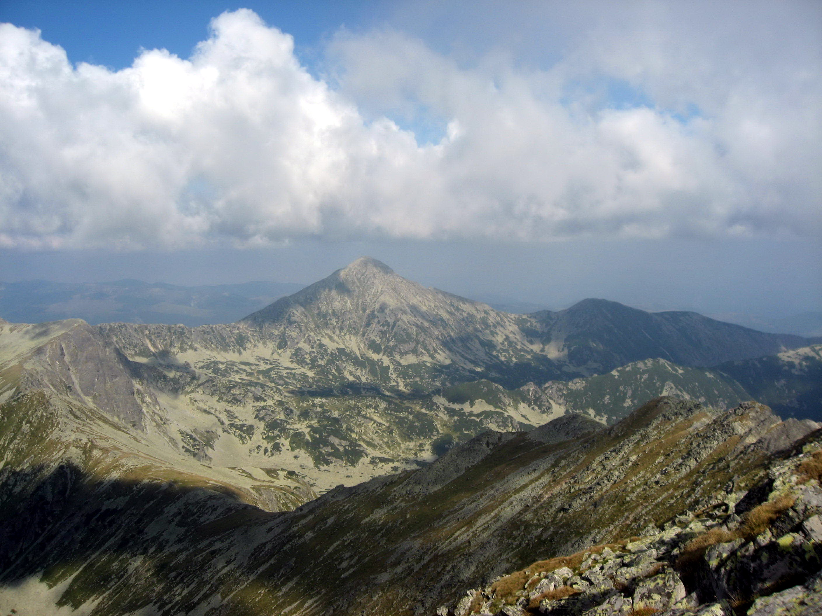 Vf. Retezat